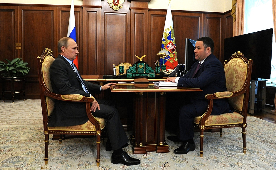 И.о. губернатора Тверской области Игорь Руденя на встрече с президентом России Владимиром Путиным 4 июля 2016 года.